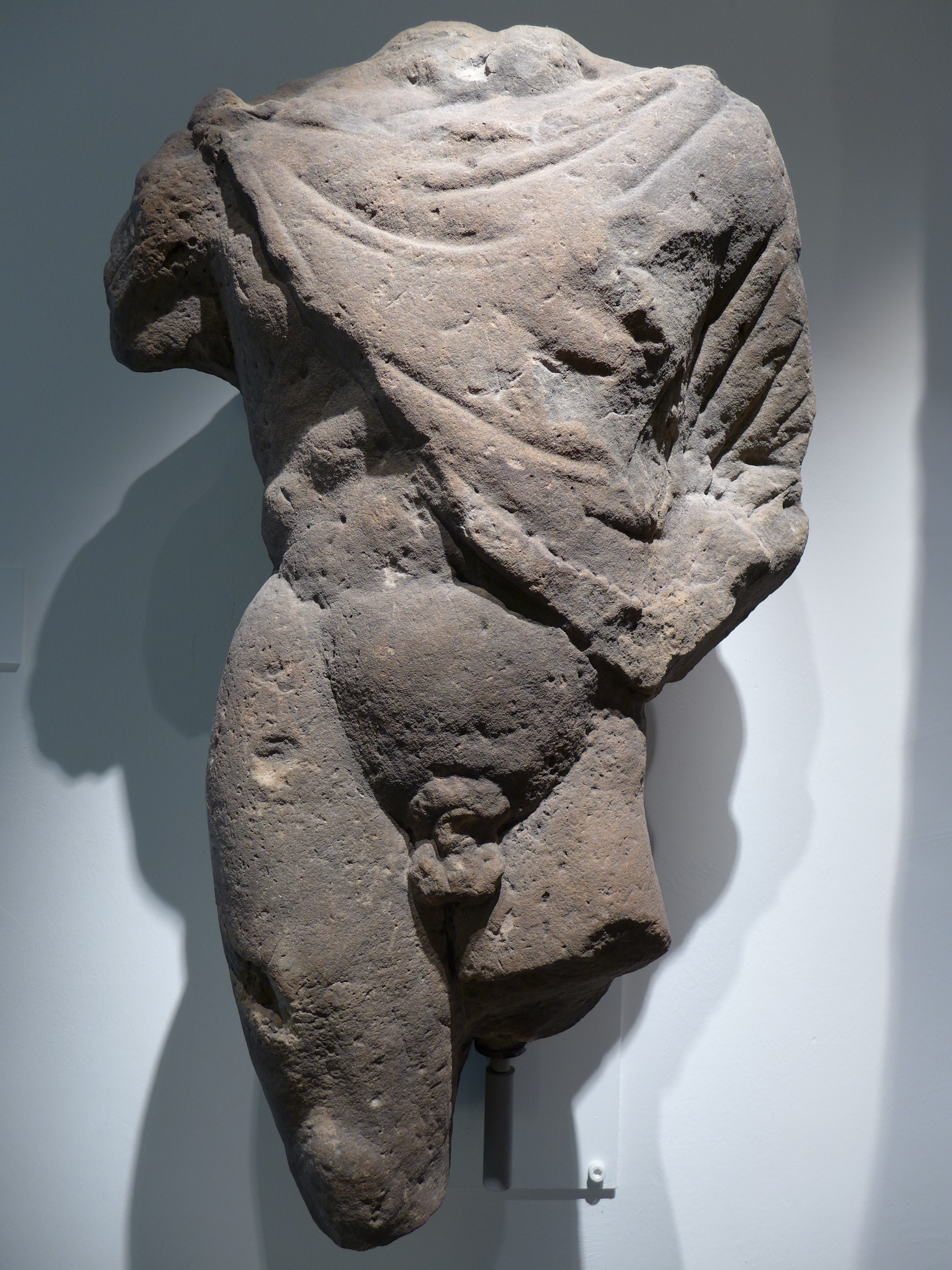 Saarbrücken, römischer Merkurtorso vom Fuße des Eschberges, Saarlandmuseum